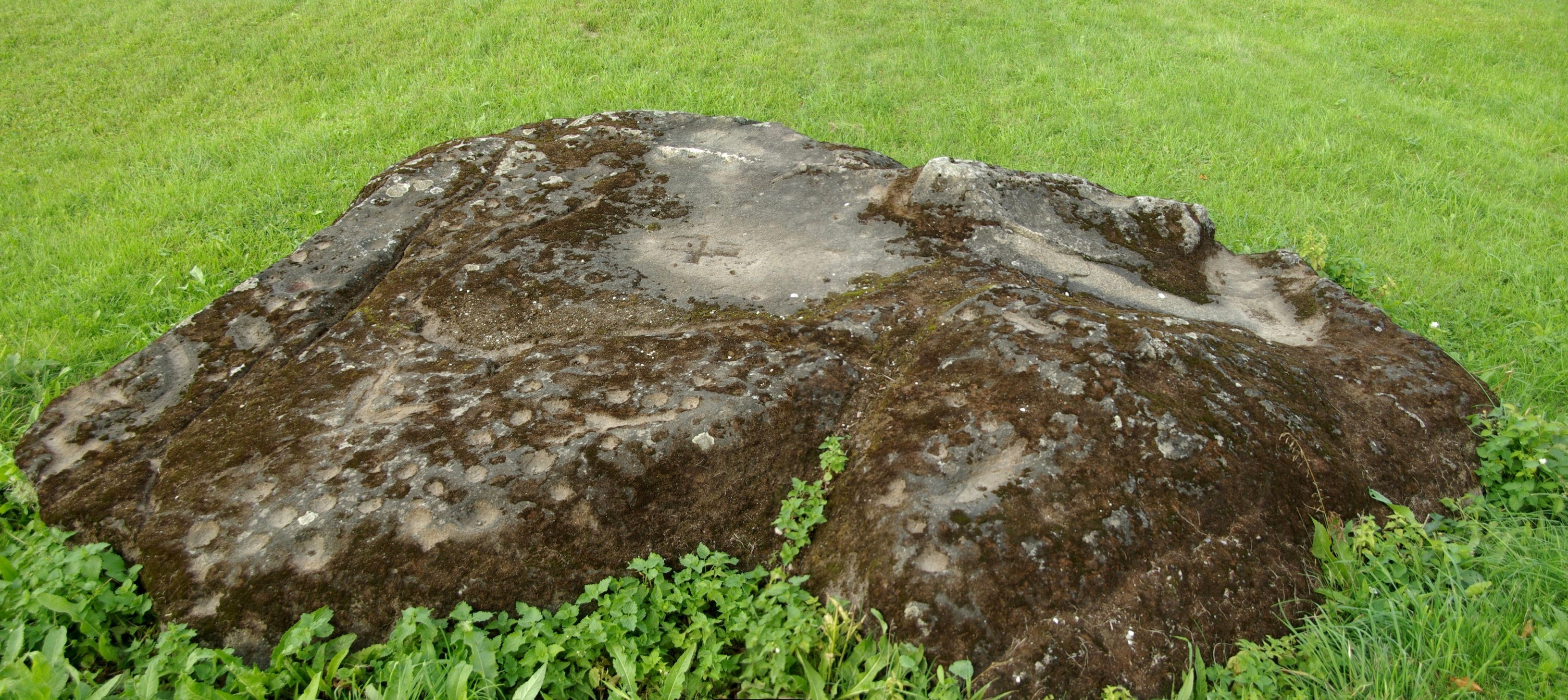 Asub Assakul uue ja vana Tartu maantee ristumiskohast 100 m Tallinna poole otse teekaldas. Kivil on 405 kunstlikku lohku ja lai sile liurenn, mis viitab kivi kasutamisele viljastusmaagiaga seotud rituaalides.